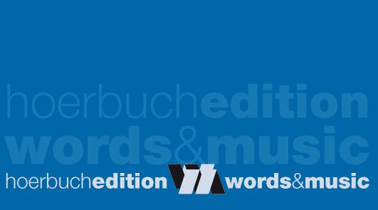 Logo hoerbuchedition words and music